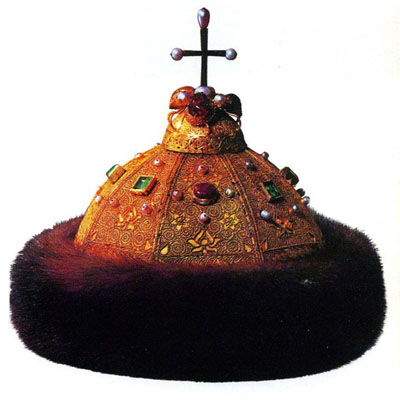 Русправ